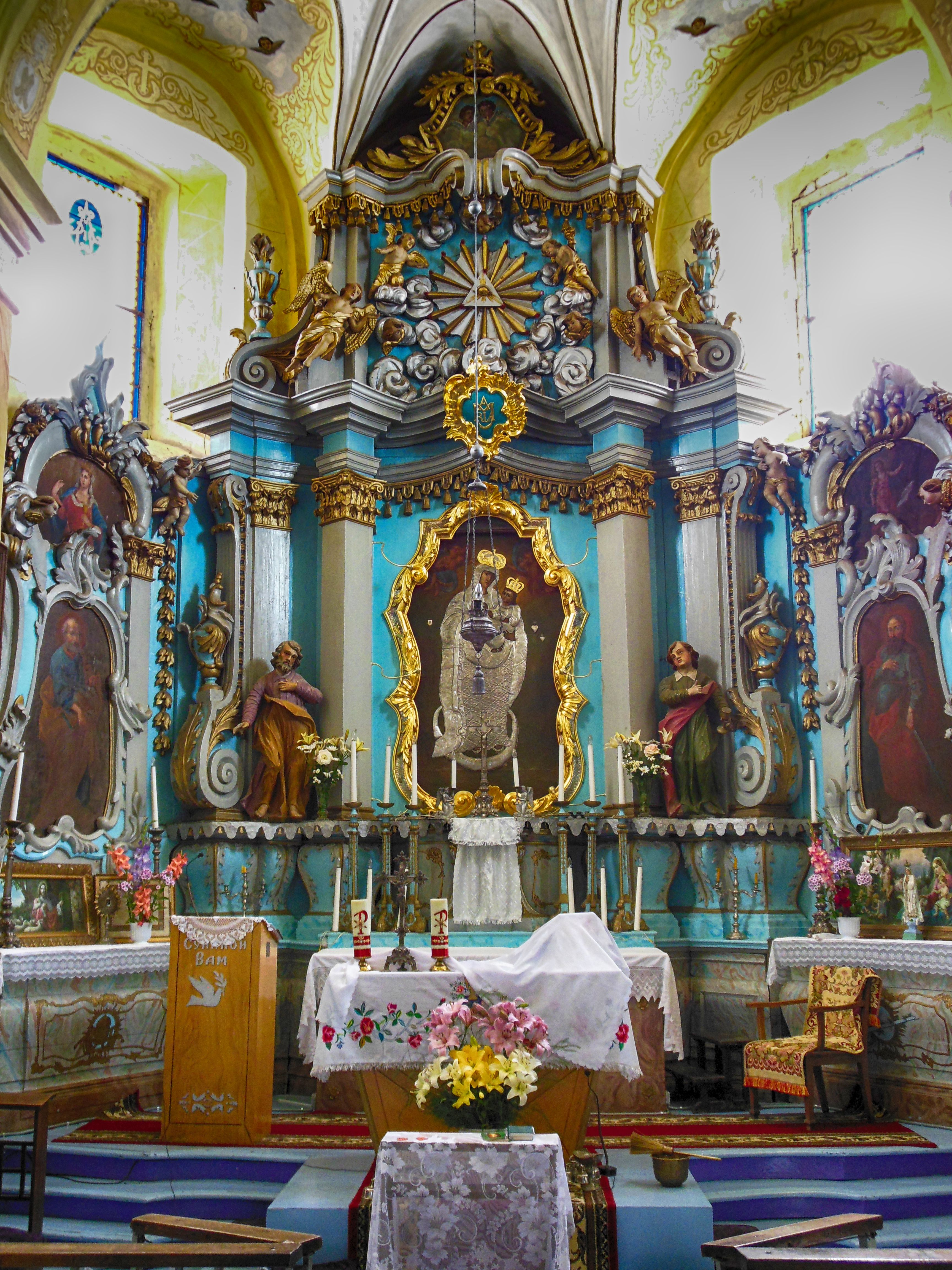 Беларуская (тарашкевіца): Касьцёл Марыі з брамай-званіцай і агароджай; дэкаратыўнае аздабленьне інтэр’еру касьцёлу — галоўны і два бакавыя алтары, дзьверы, лавы ў алтары. в. Вішнева This is a photo of Belarusian heritage monument. Reference number: 612Г000082 ( WLM)